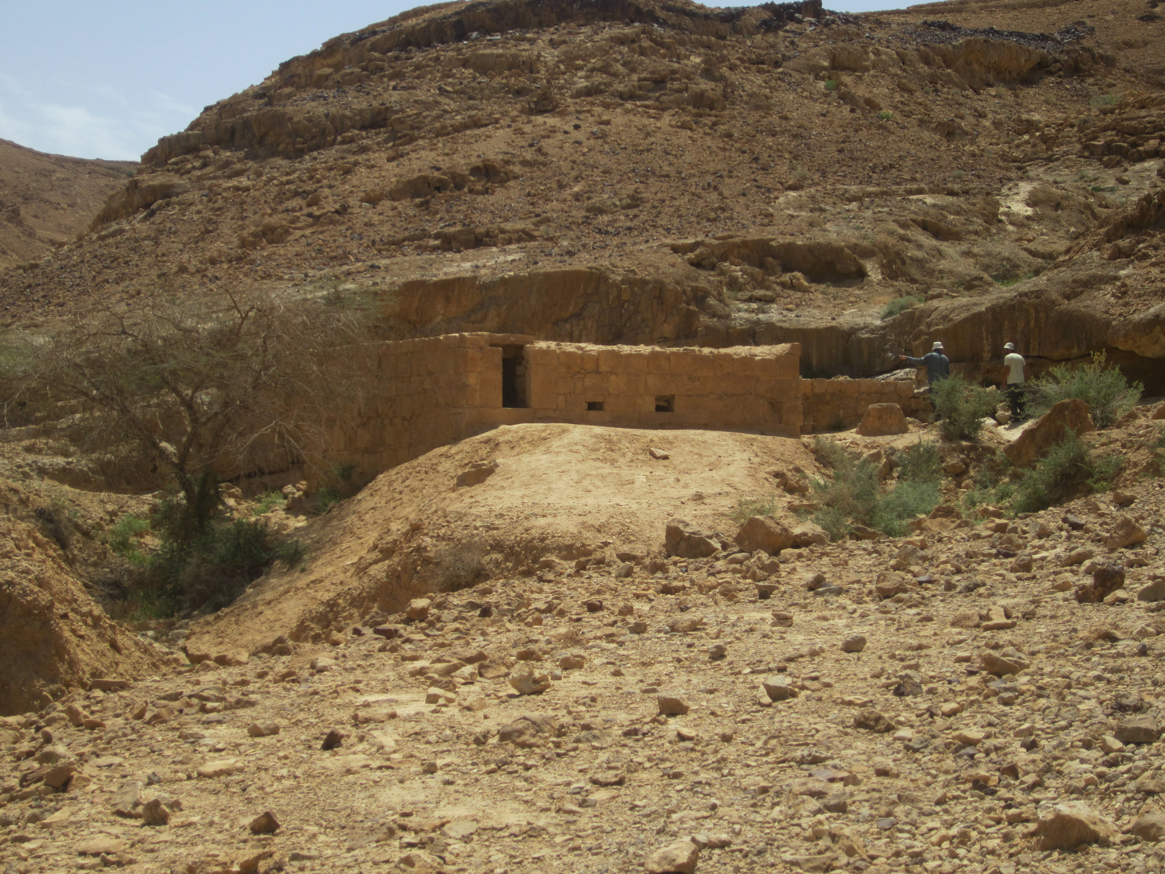 מצד נקרות צולם במסגרת קמפוס דרכים עתיקות בנגב, המחלקה ללימודי ארץ ישראל במכללה האקדמית כנרת